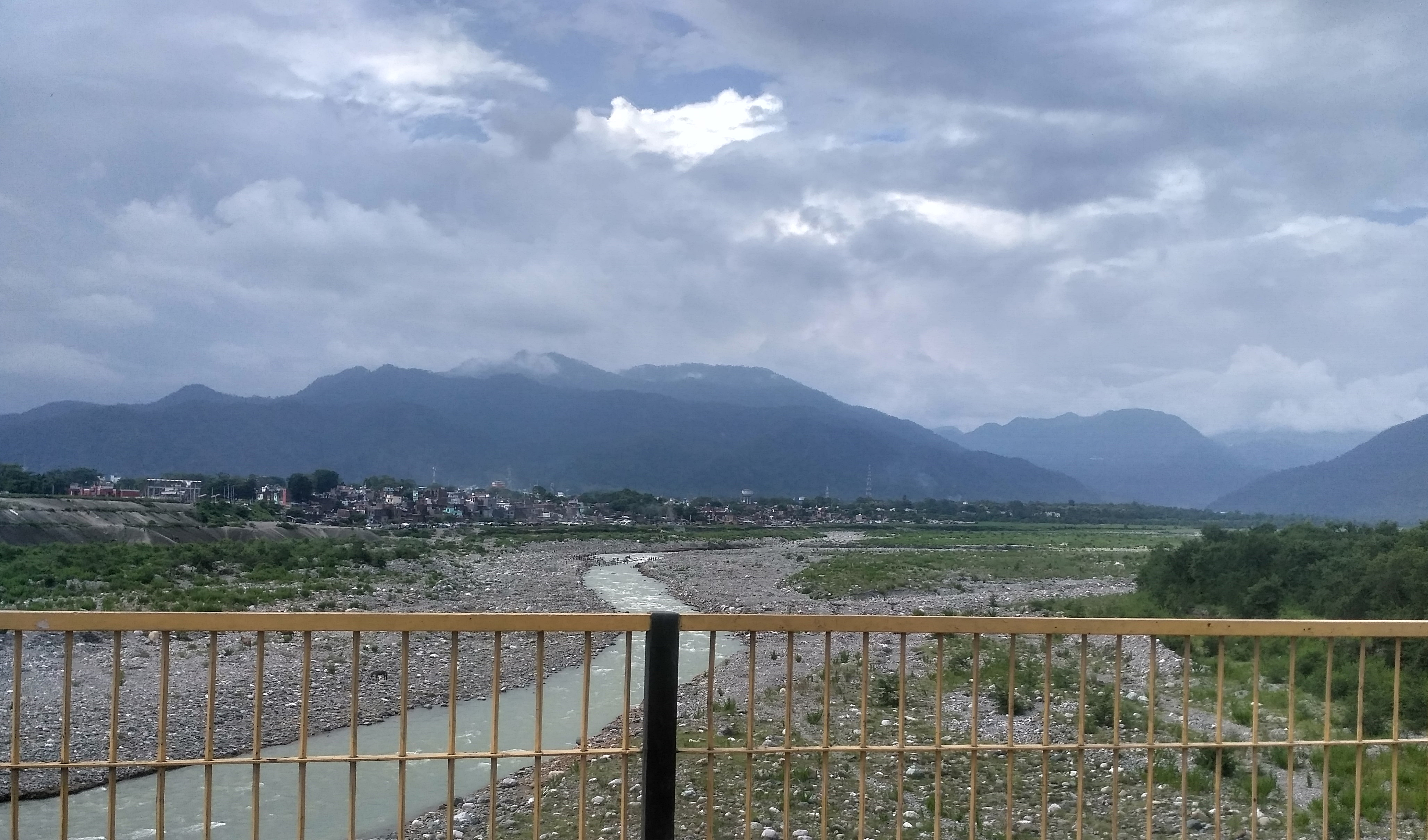 गौलापार हल्द्वानी उत्तराखंड